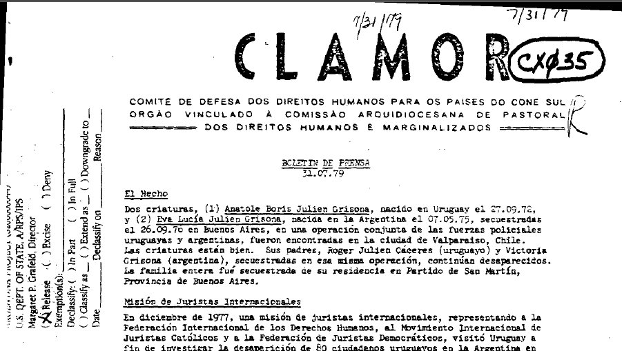 Fragmento de una noticia publicada por CLAMOR (Comité de Defesa dos Direitos Humanos para os Paises Do Cone Sul Orgao Vinculado a Comissao Arquidiosecana de Pastoral dos Direitos Humanos e Marginalizados. En la misma se anuncia que fueron localizados dos niños desaparecidos (Anatole Boris y Eva Lucía Julien Grisona)en Chile.